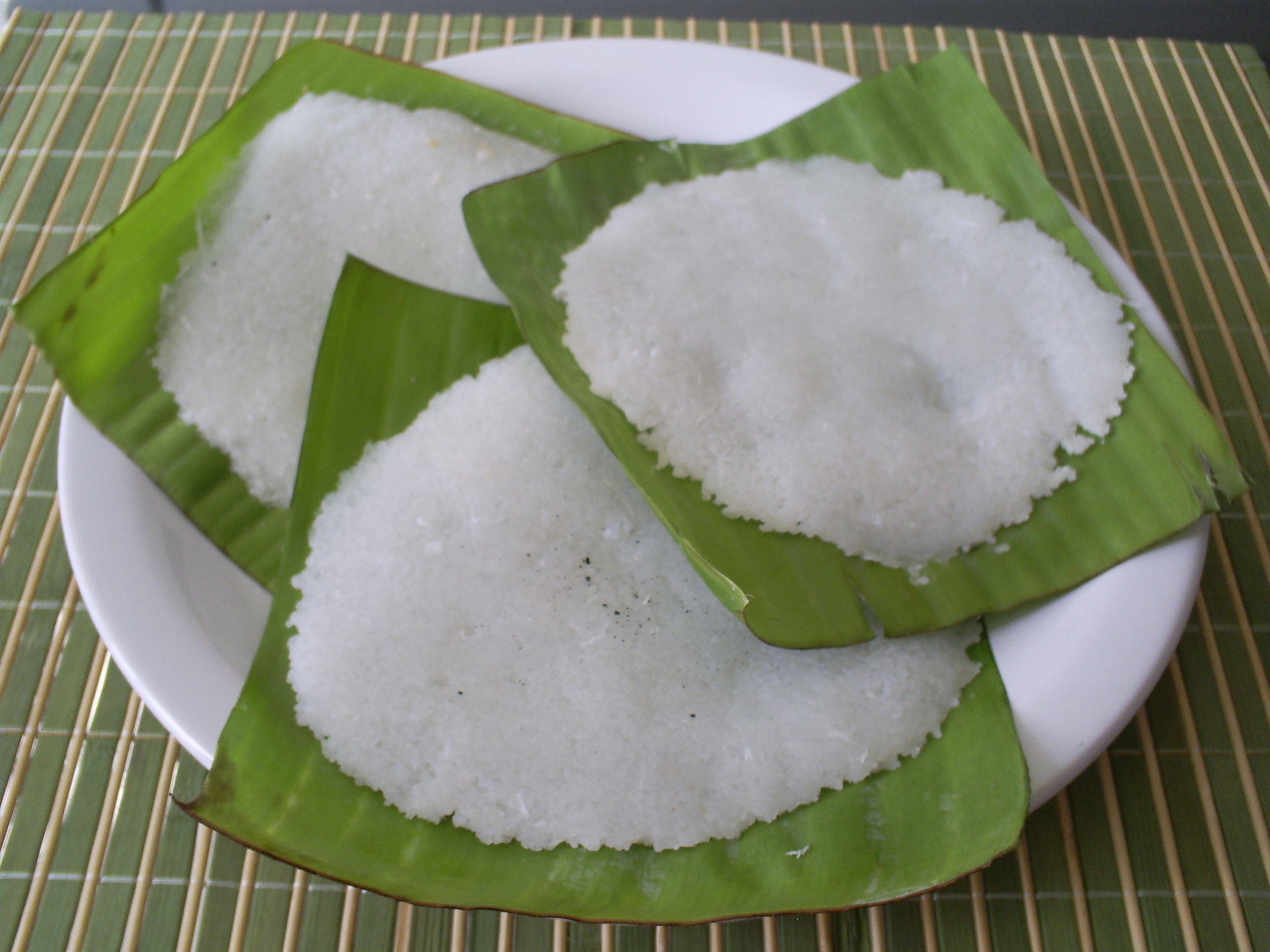 Prato típico região norte e nordeste do Brasil; goma de mandioca, leite de coco e açúcar servido em folha de bananeira